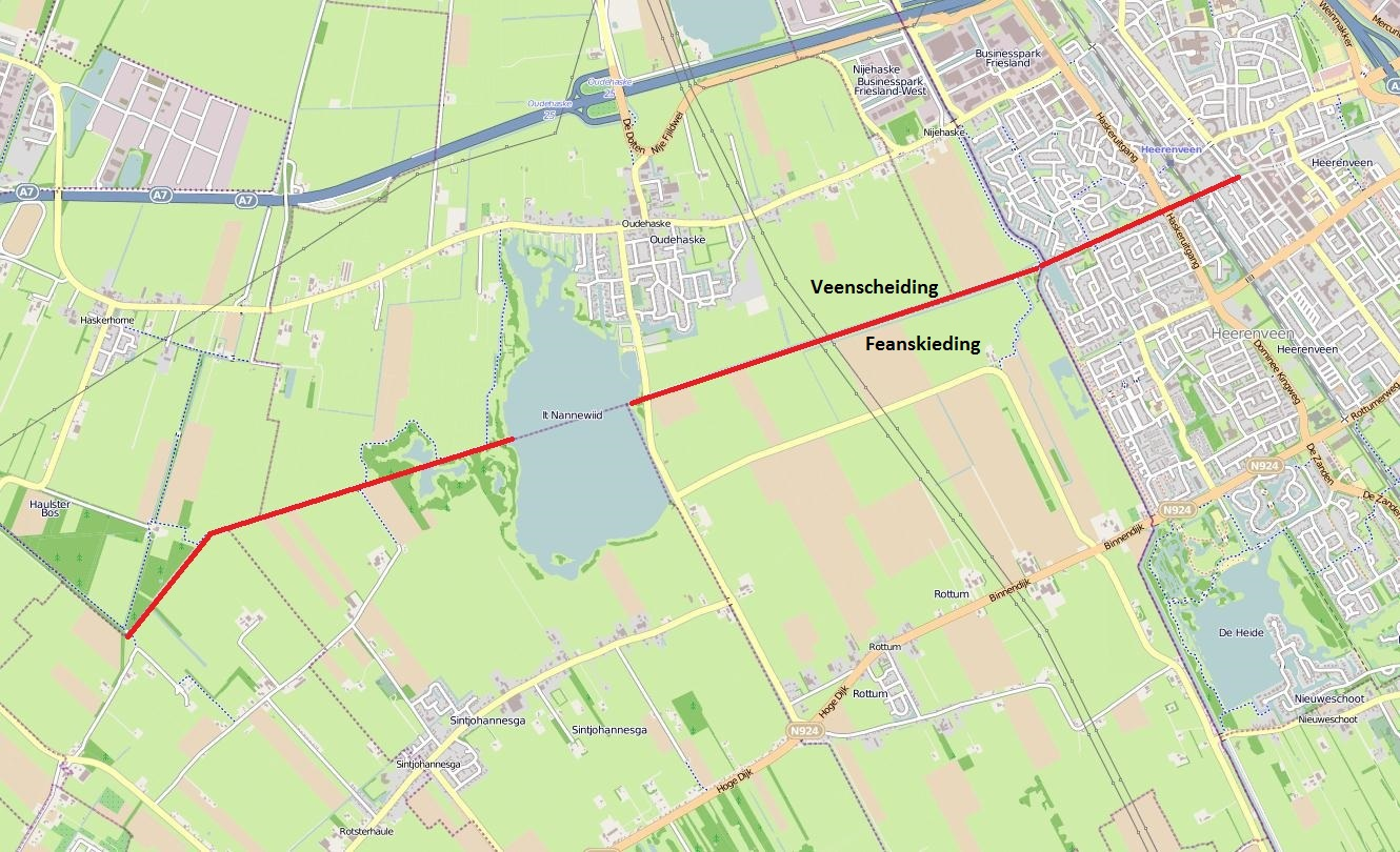 Veenscheiding (Fries en officieel: Feanskieding), kanaal in Friesland